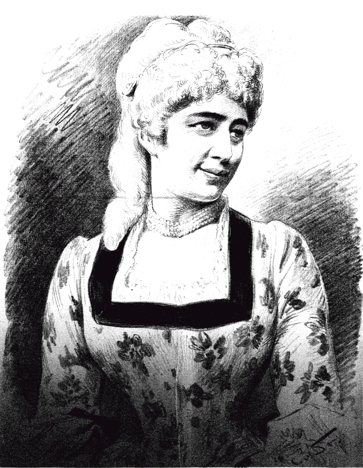 Babette Reinhold (Birth name: Babette Maasch; 1863–1940), German-Austrian actress